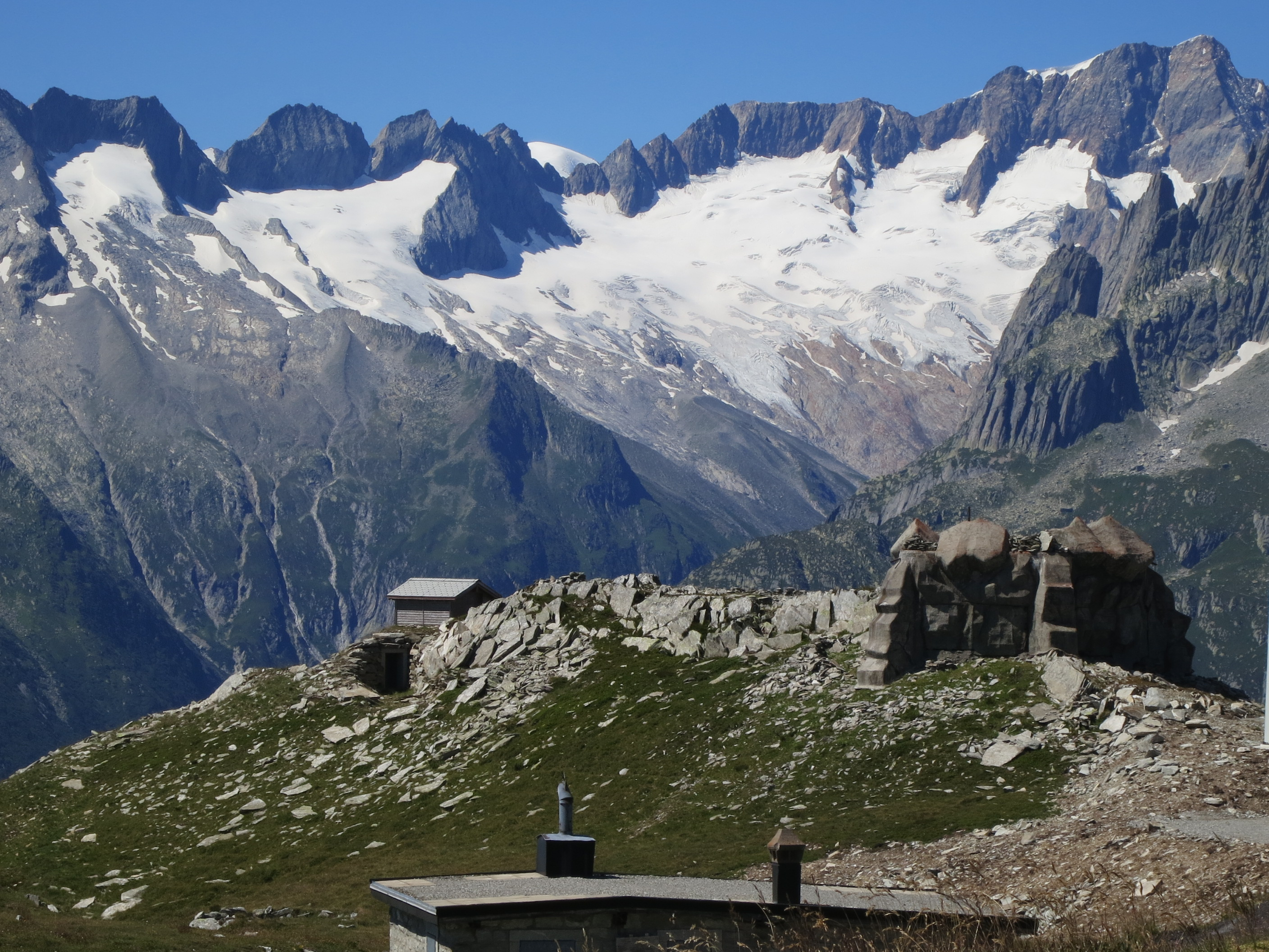 Artilleriewerk Gütsch, Andermatt UR, Schweiz